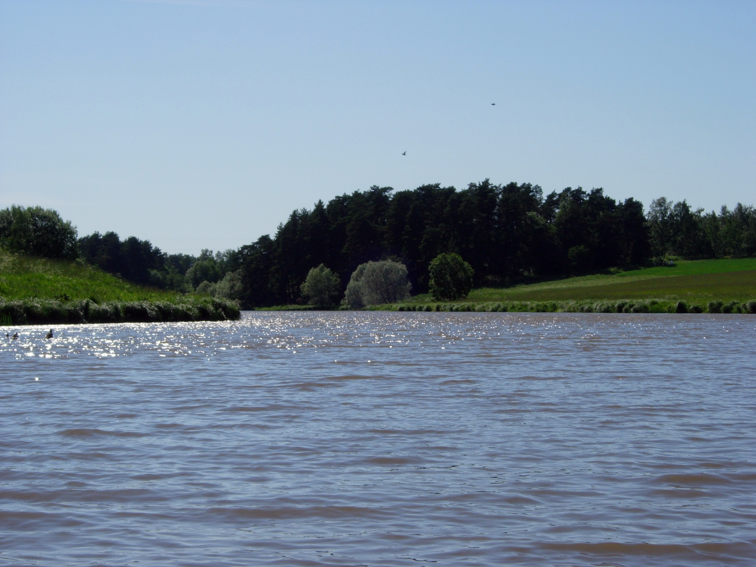 Aurajokea Halisten lähettyviltä